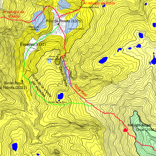 Mapa de la zona del Pico Posets Elaborada por el autor Usuario:Avh, a "ratón alzado" utilizando GIMP. Las curvas de nivel y los topónimos proceden de diversas fuentes consultadas. Las rutas trazadas según la experiencia personal.